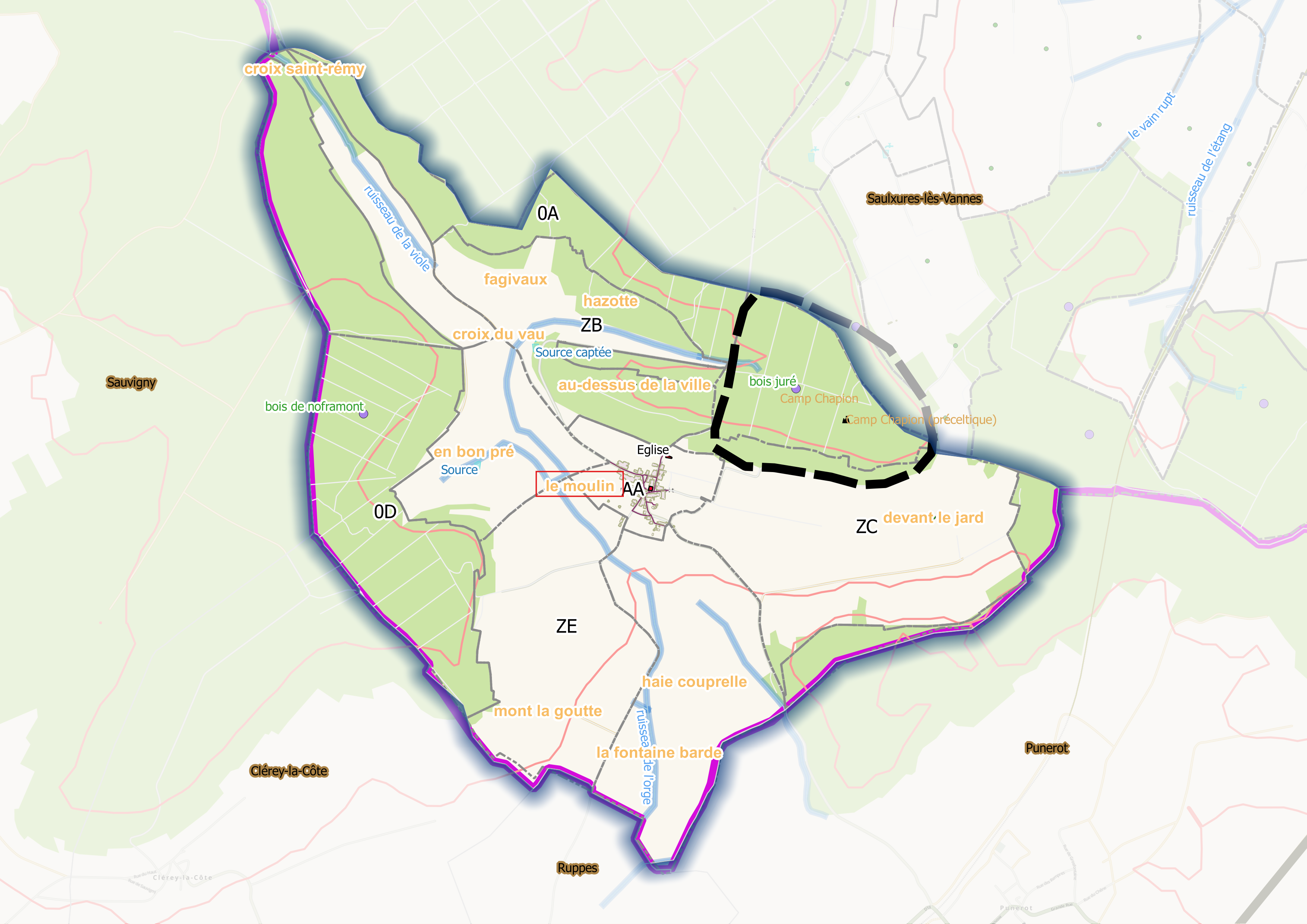 Mont-l-étroit (Ban communal) OSM et Qgis, mentions manuscrites